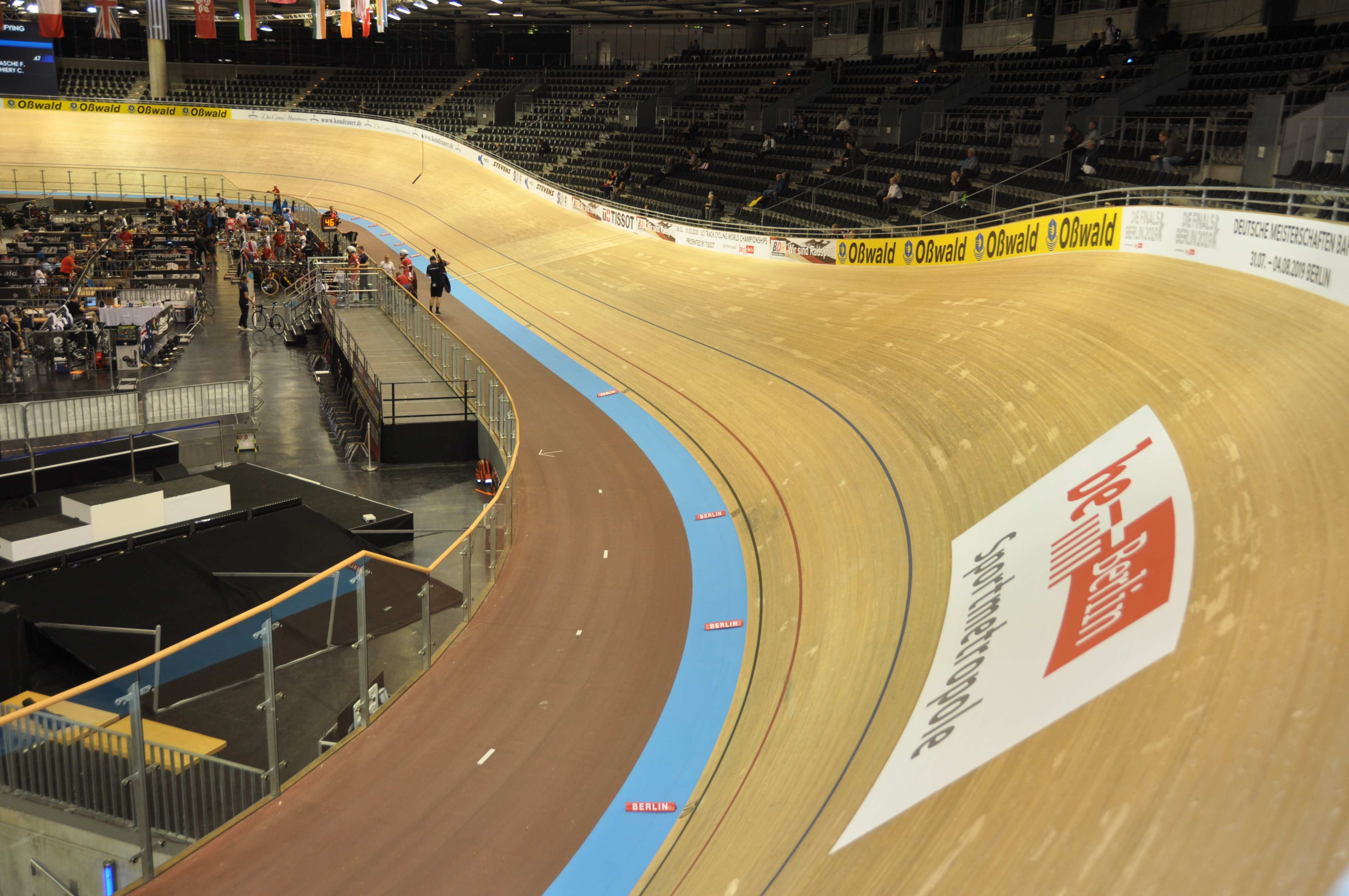 Innenraum des Velodroms